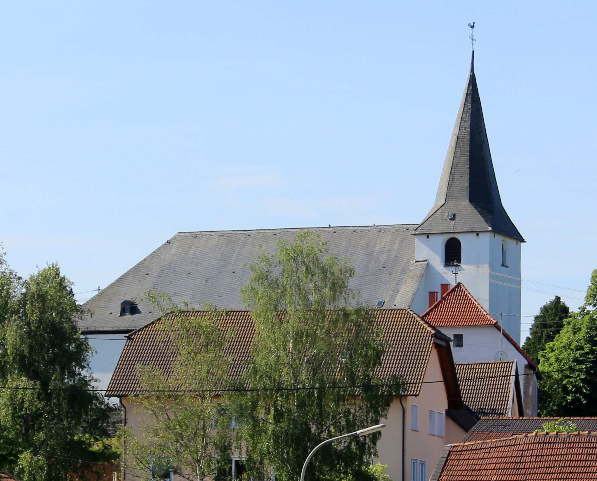 Evangelische Kirche in Wolfersweiler, Gemeinde Nohfelden, Landkreis St. Wendel, Saarland